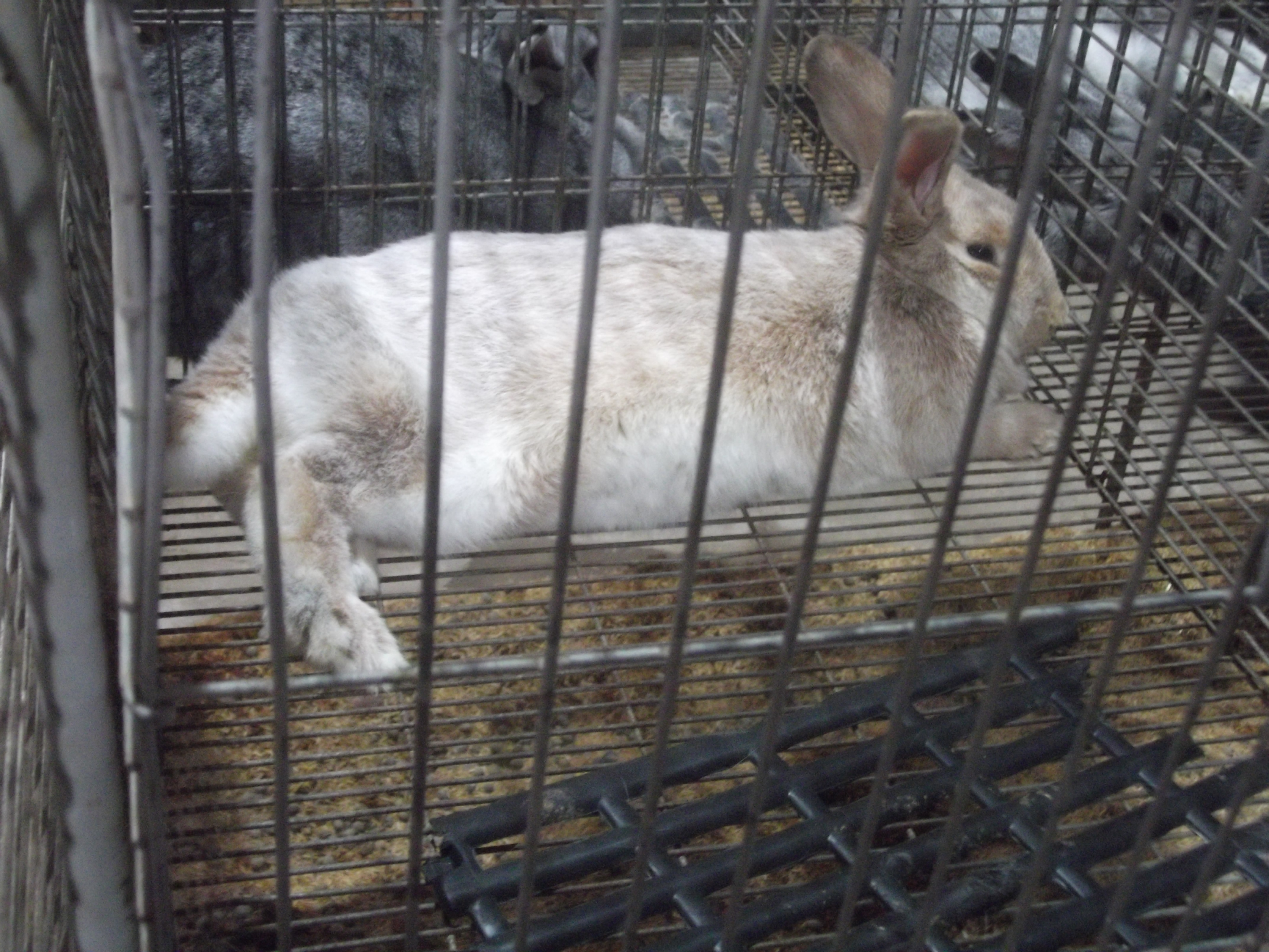 EXPOINTER 2013